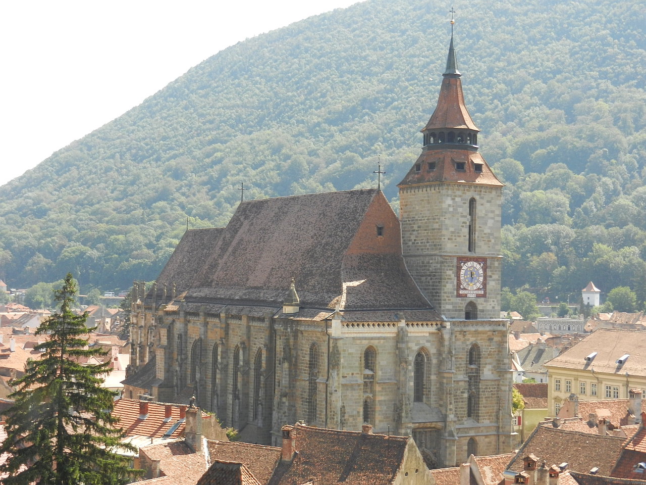 Biserica evanghelică „Biserica Neagră” 01